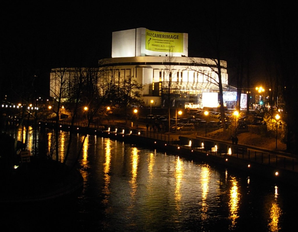 Opera Nova (centrum festiwalowe) w Bydgoszczy podczas Międzynarodowego Festiwalu Sztuki Autorów Zdjęć Filmowych Plus Camerimage 2011